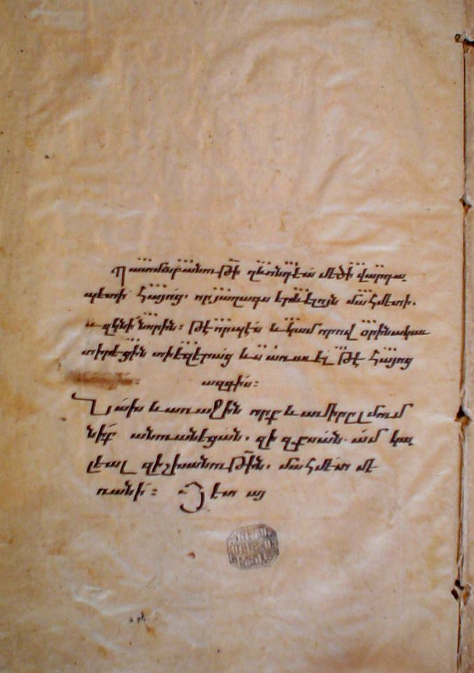 Страница из рукописи «Истории Халифов» армянское историка VIII века Гевонда